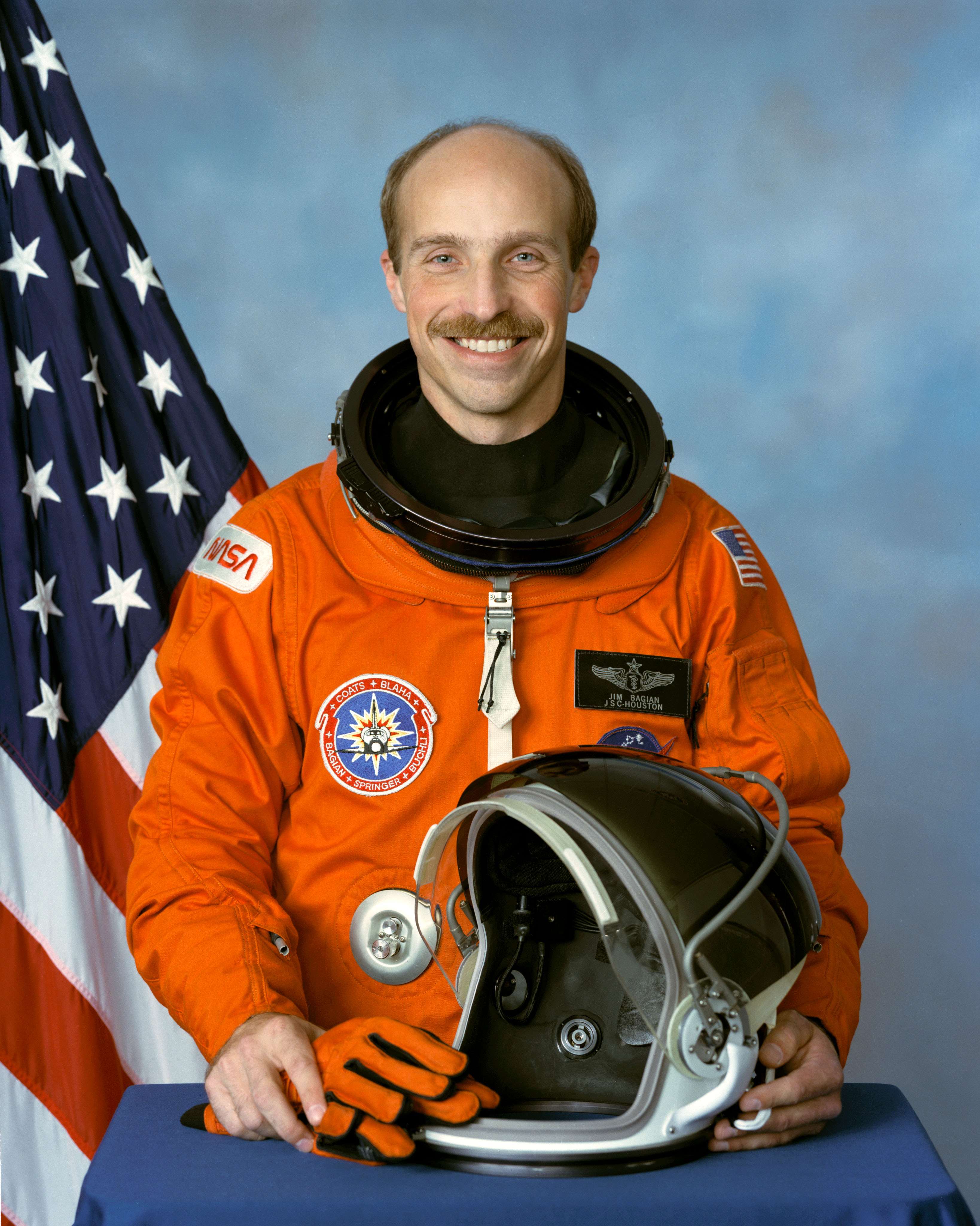 US Astronaut James Philipp Bagian